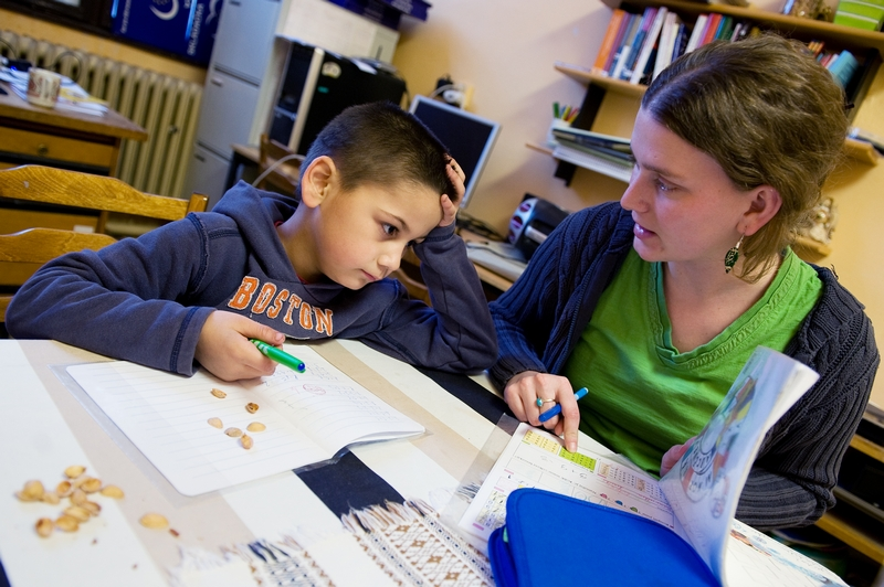 Projekt finacovaný z OP VK.